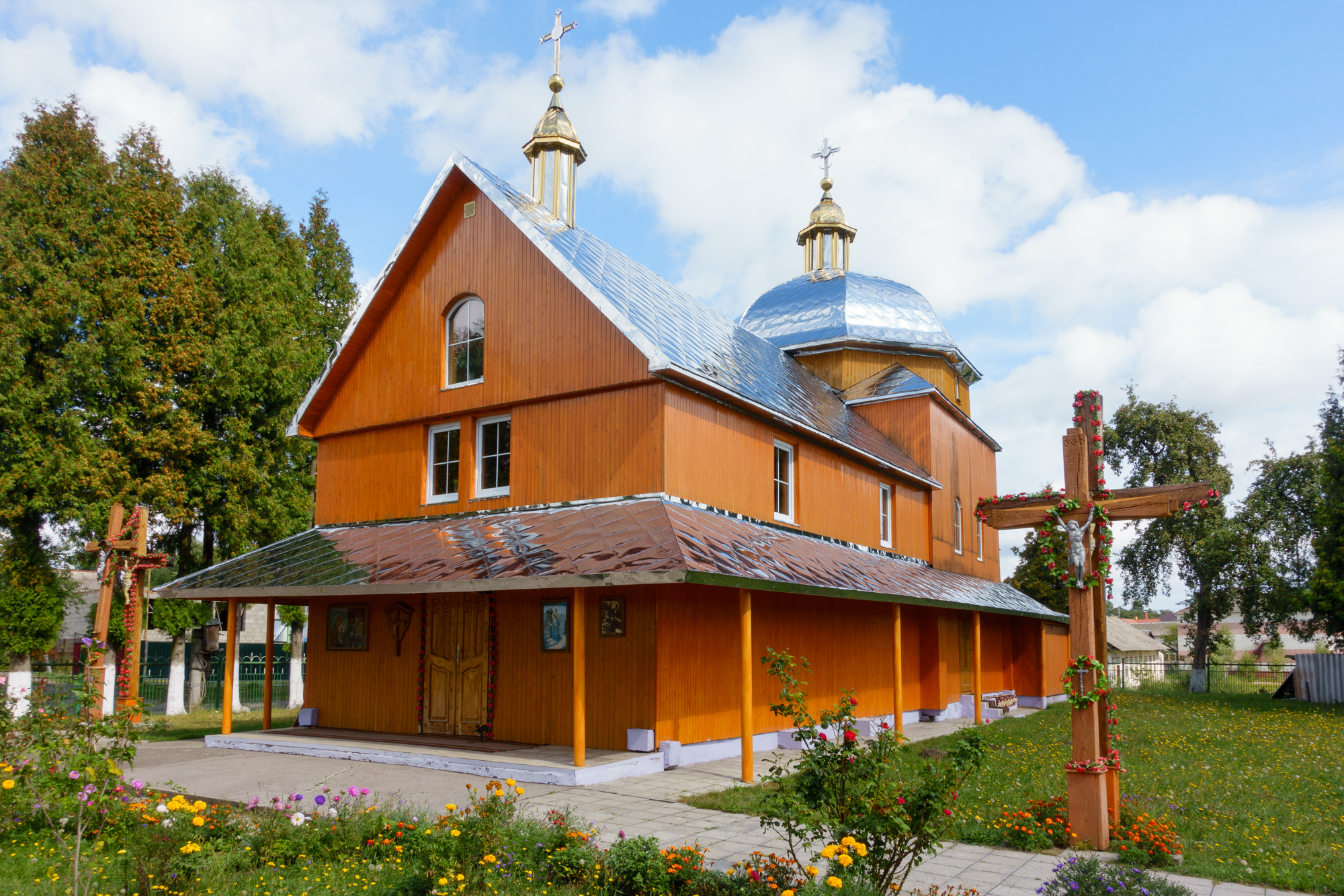 Церква Св. Євстахія (дер.), с. Чолгині Яворівського району Львівськой області